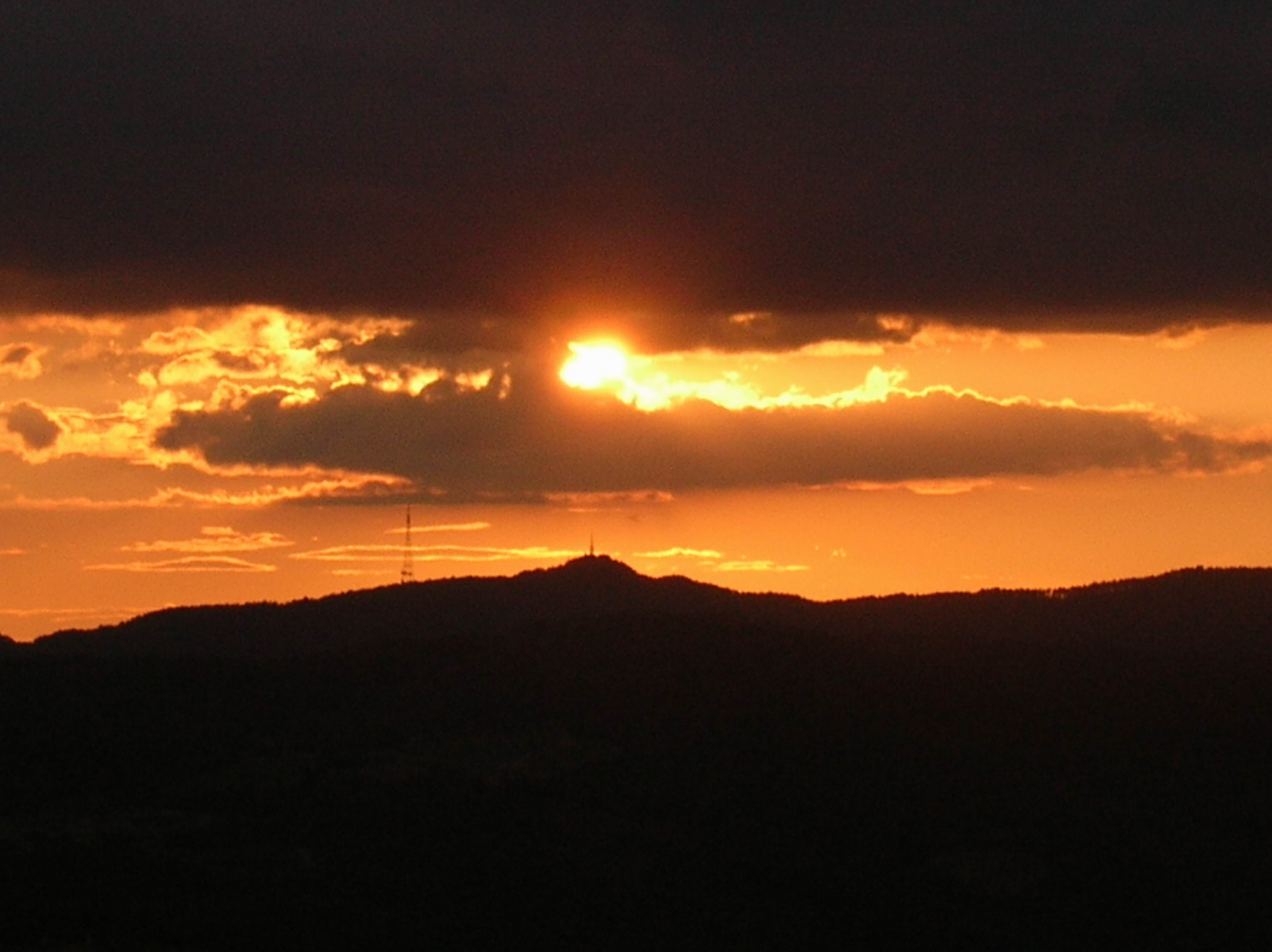 Tramonto estivo sul Chianti aretino - Arezzo - Italia